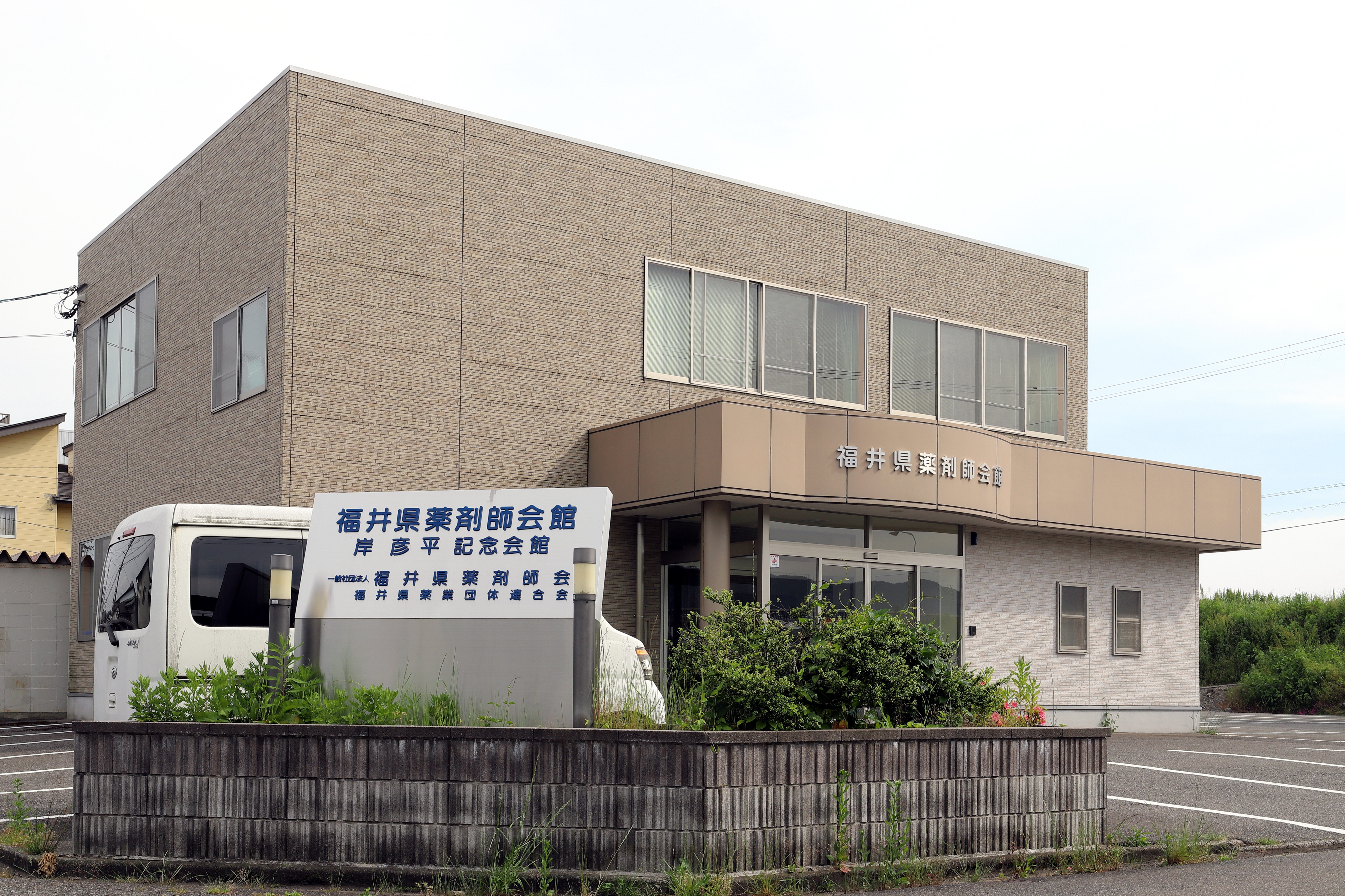 福井県薬剤師会館 Canon EOS 6D Mark II